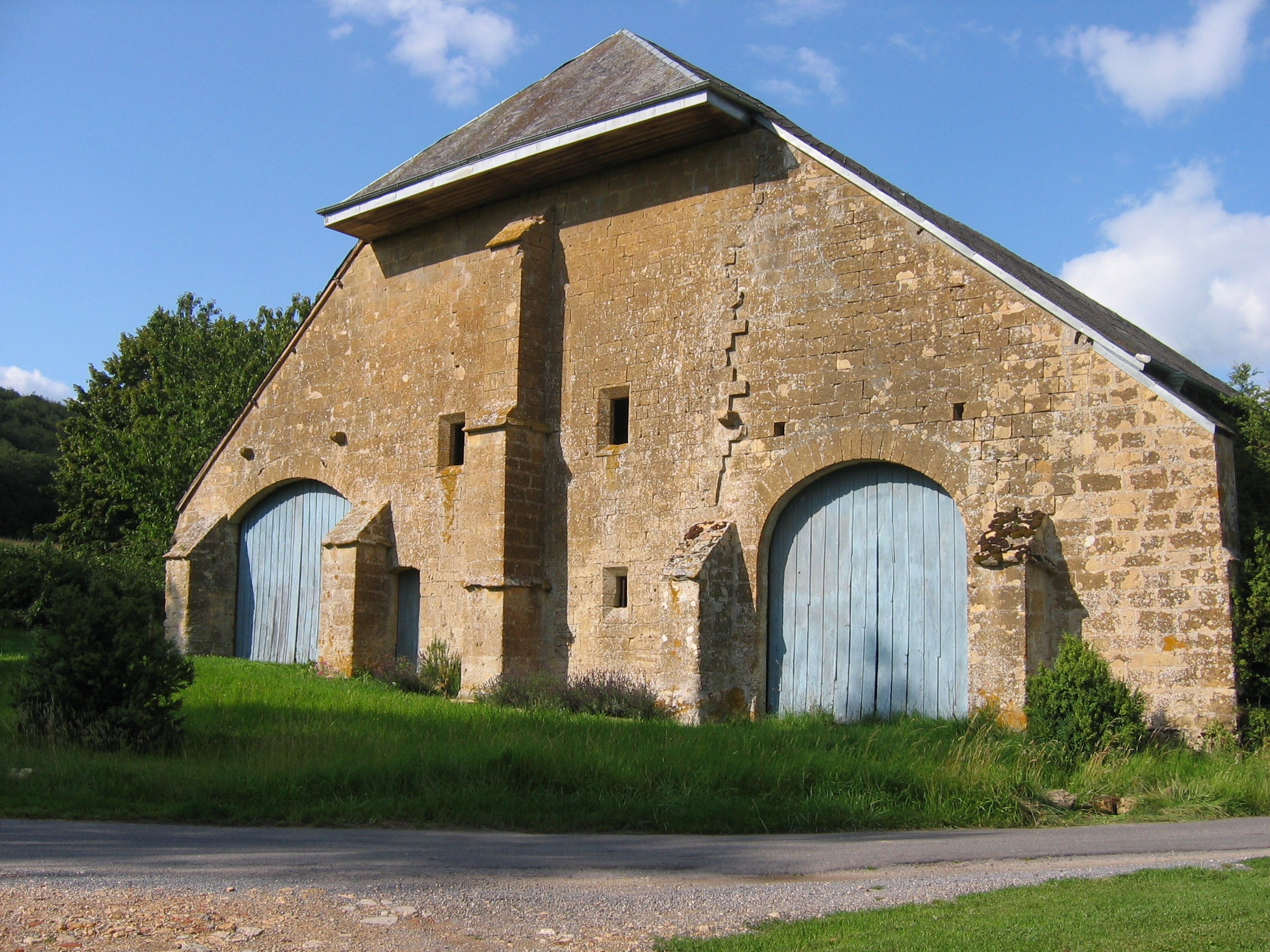 grange monumentale de la Correrie à proximité de la Chartreuse du Mont Dieu, Ardennes, France